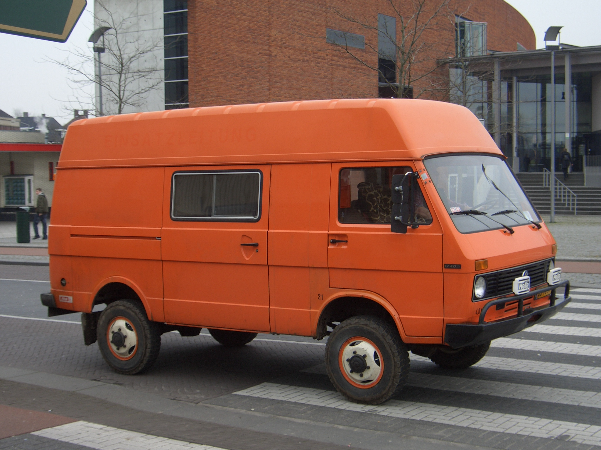 VW LT 40D Sülzer 4x4 (Gen1 1975-1995), 1980, seen in Venlo, Netherlands